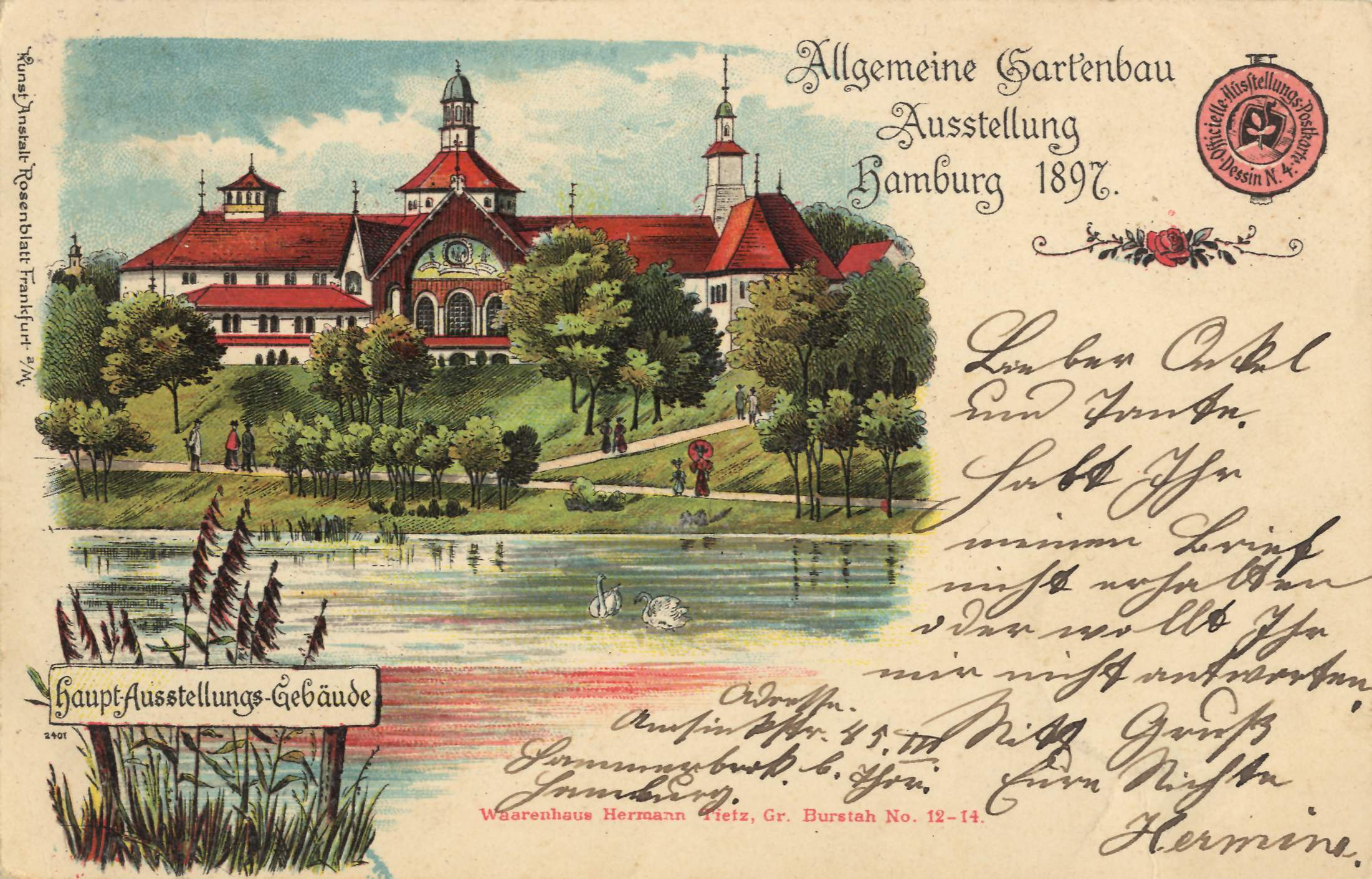 Allgemeine Gartenbau-Ausstellung 1897, Haupt-Ausstellungsgebäude